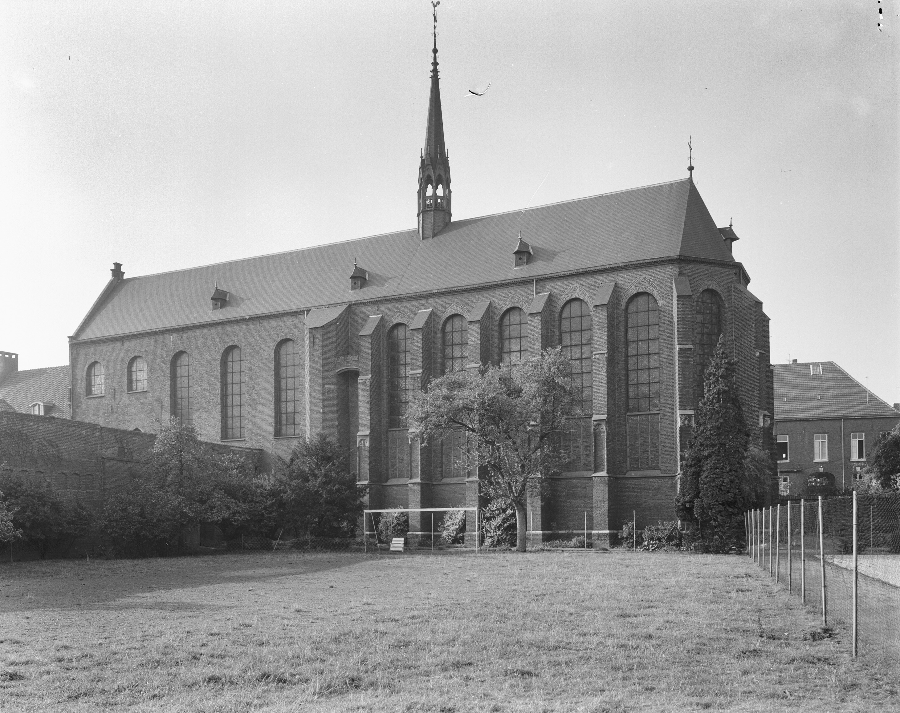 Voormalig Karthuizer Klooster (Groot Seminarium): kapel naar het noord-westen